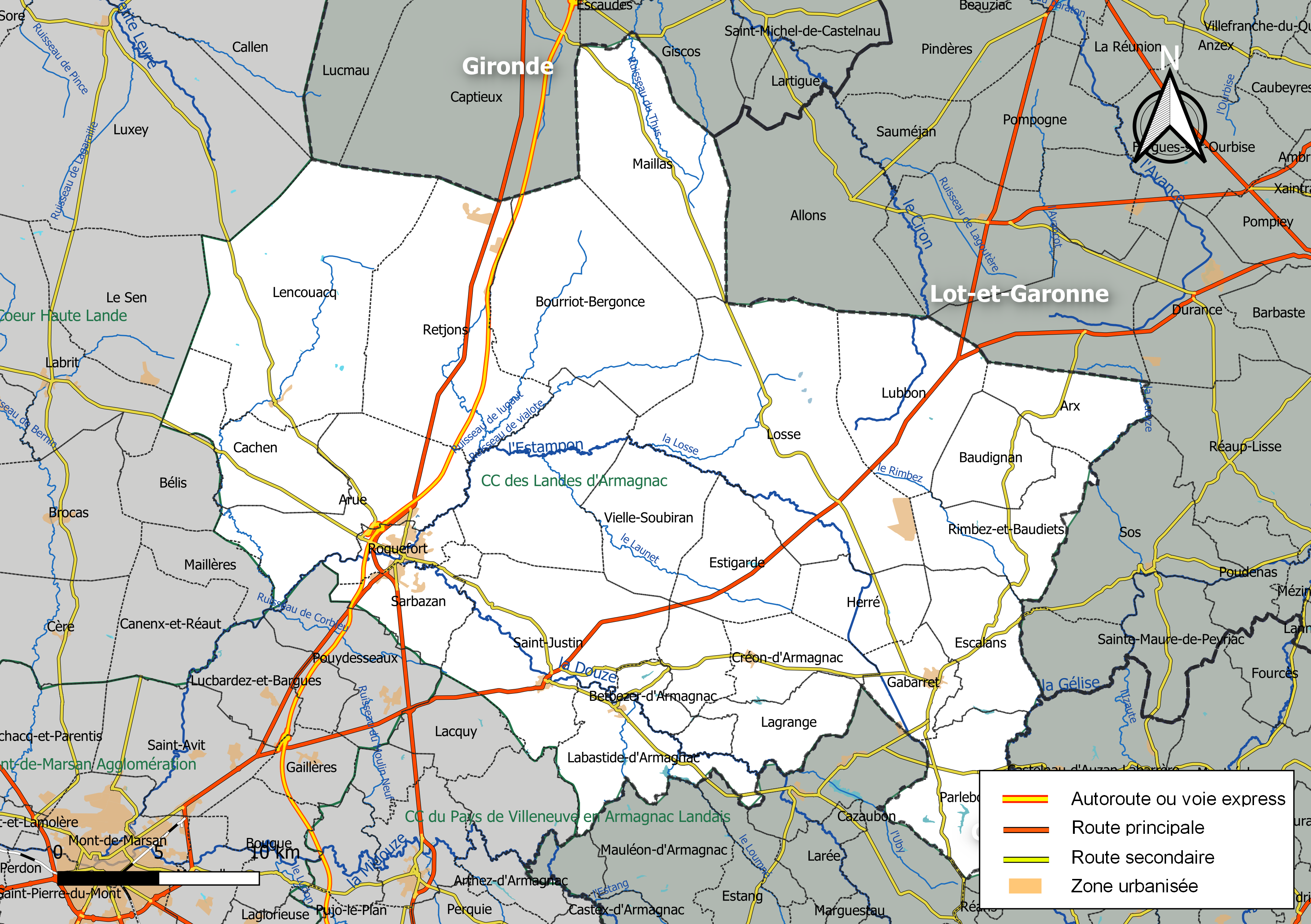 Carte géographique de la Communauté de communes des Landes d'Armagnac, département des Landes, France. Composition au 1er janvier 2019.